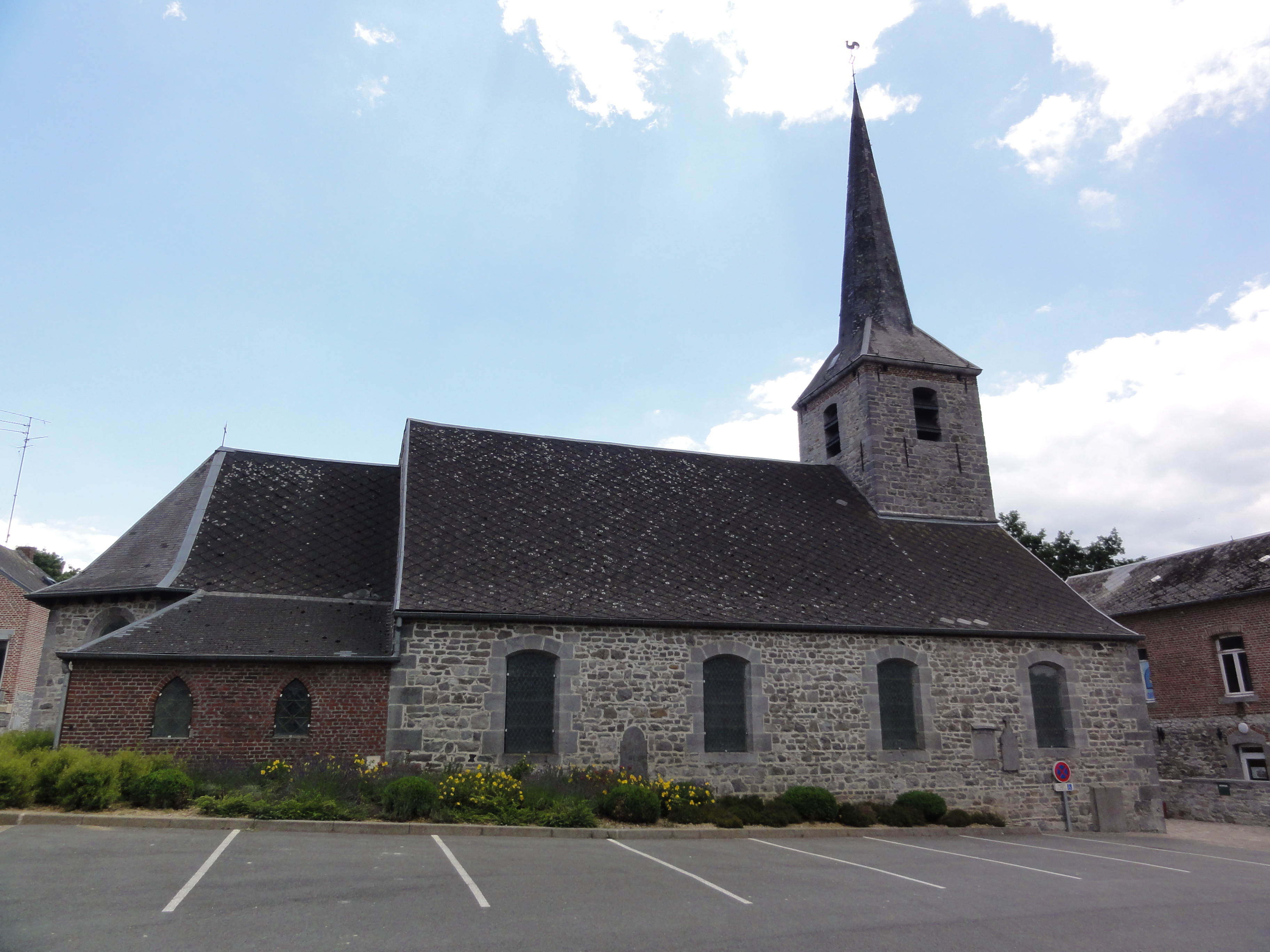 Saint-Remy-du-Nord (Nord, Fr) église, vue latérale